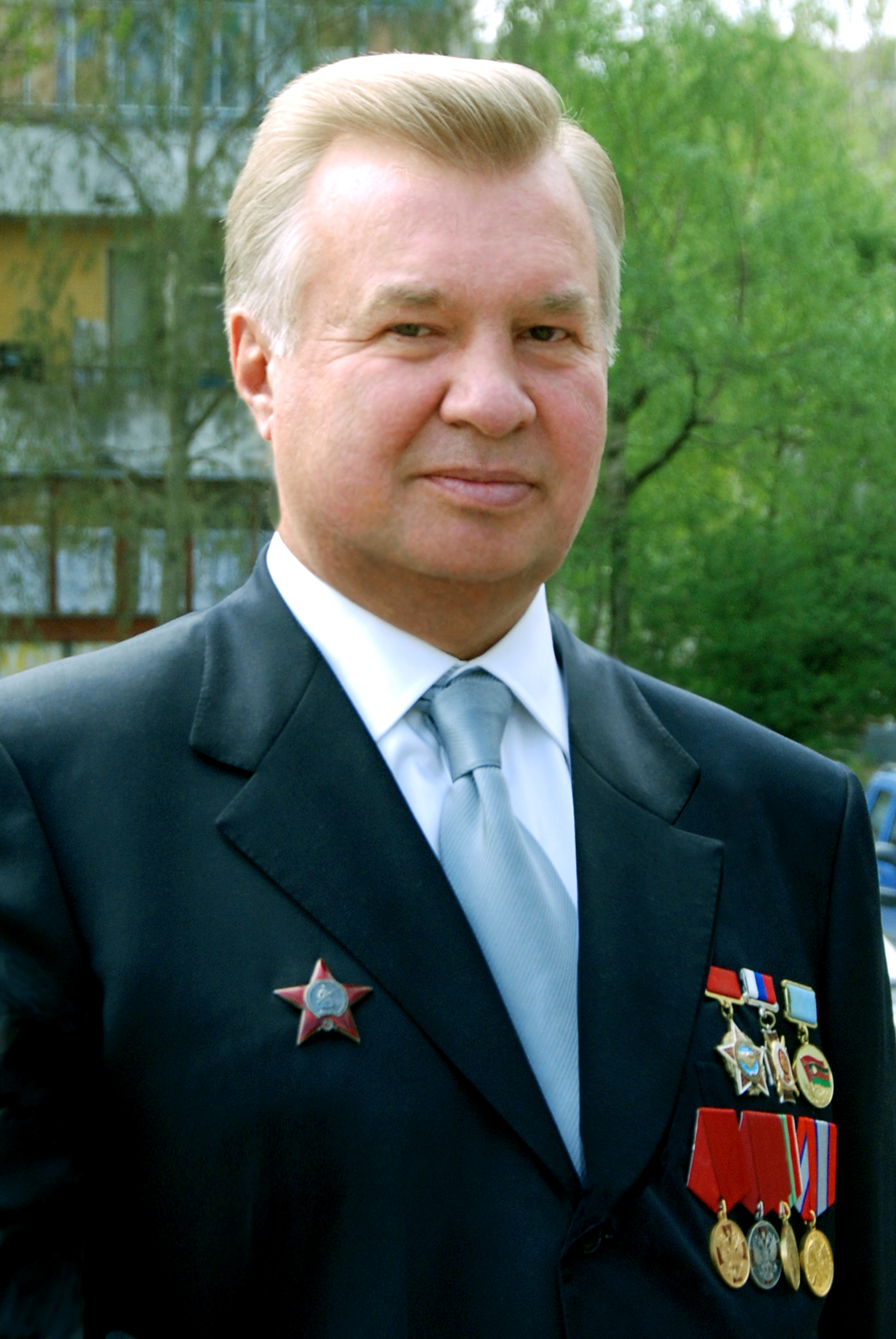 Игорь Владимирович Высоцкий — юрист, депутат Законодательного собрания Санкт-Петербурга 1, 3, 4, 5 созыва. В 1979—1981 служил в Афганистане. Заместитель Председателя Всероссийской общественной организации ветеранов «Боевое братство».